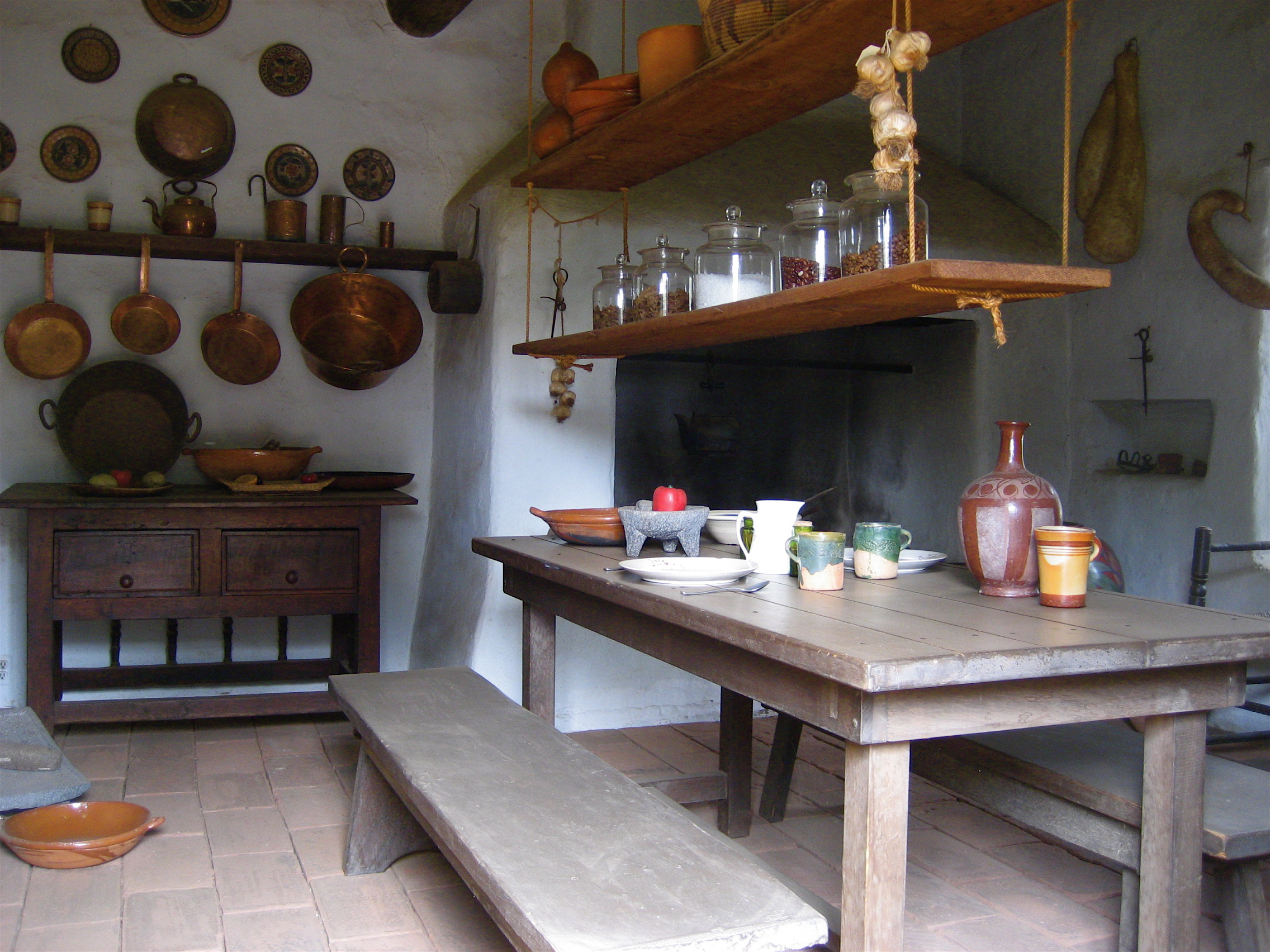 Kitchen, Casa de Estudillo